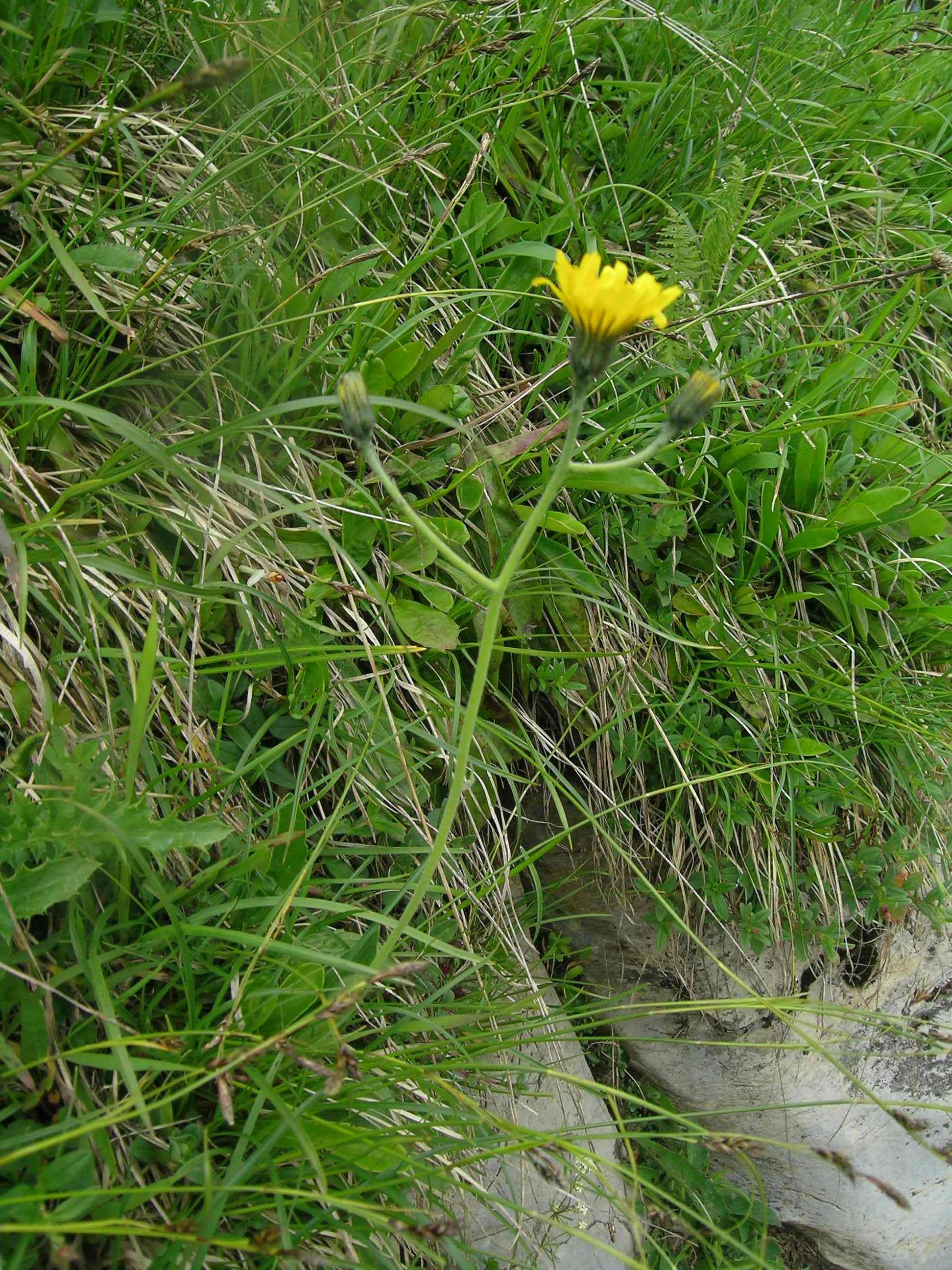 Hieracium bifidum, Schynige Platte, Kanton Bern, Schweiz